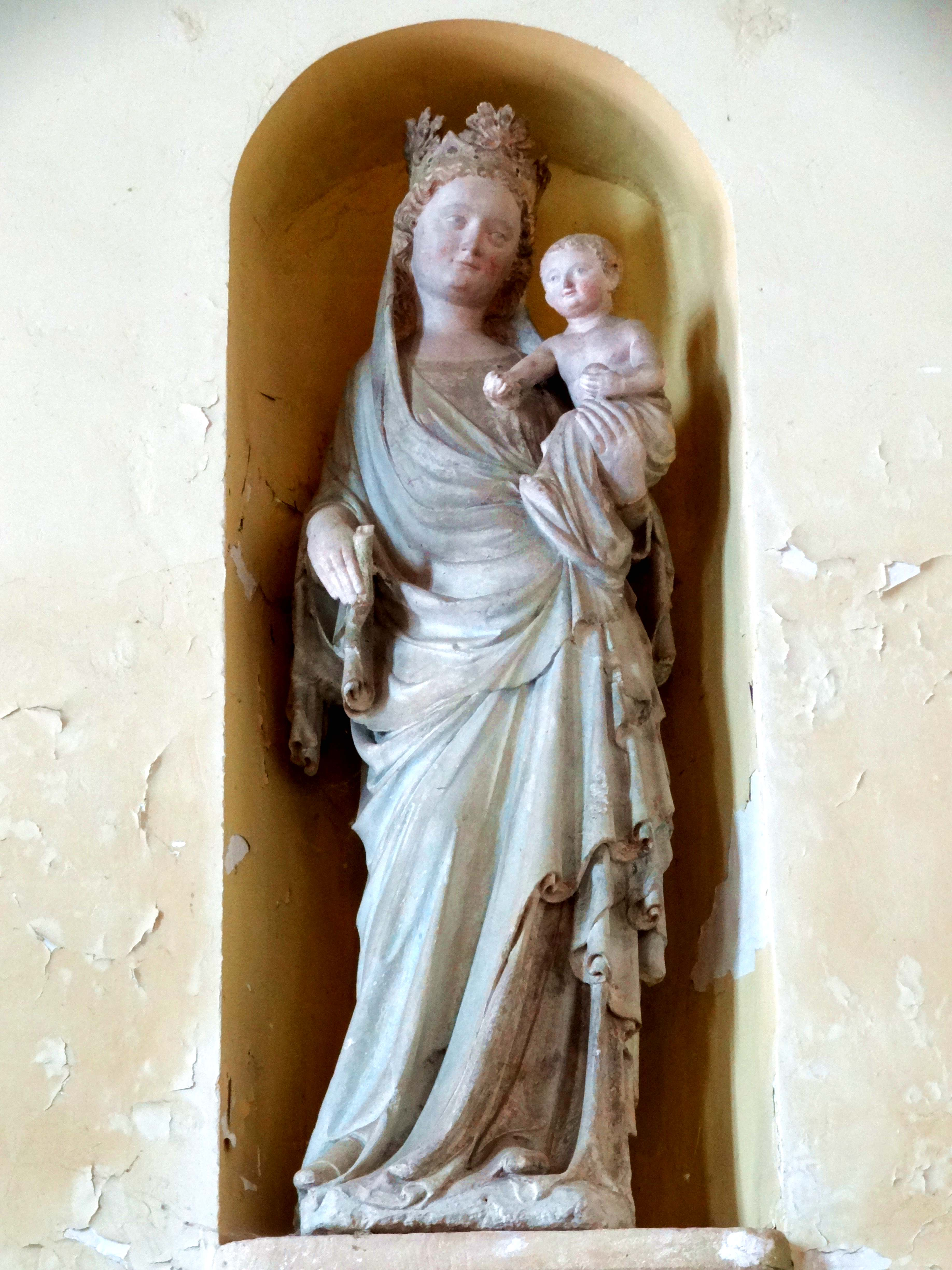 Mobilier de l'église - voir titre.